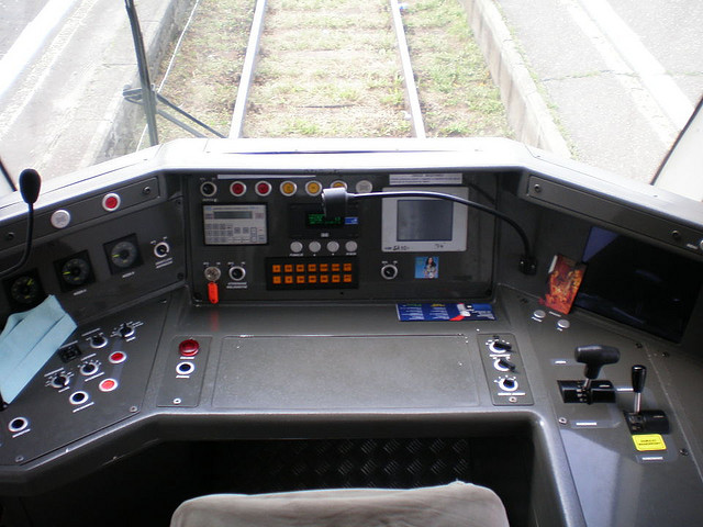 2007.06.17 - 043 Gdynia Główna, SA 103-006 railbus cockpit